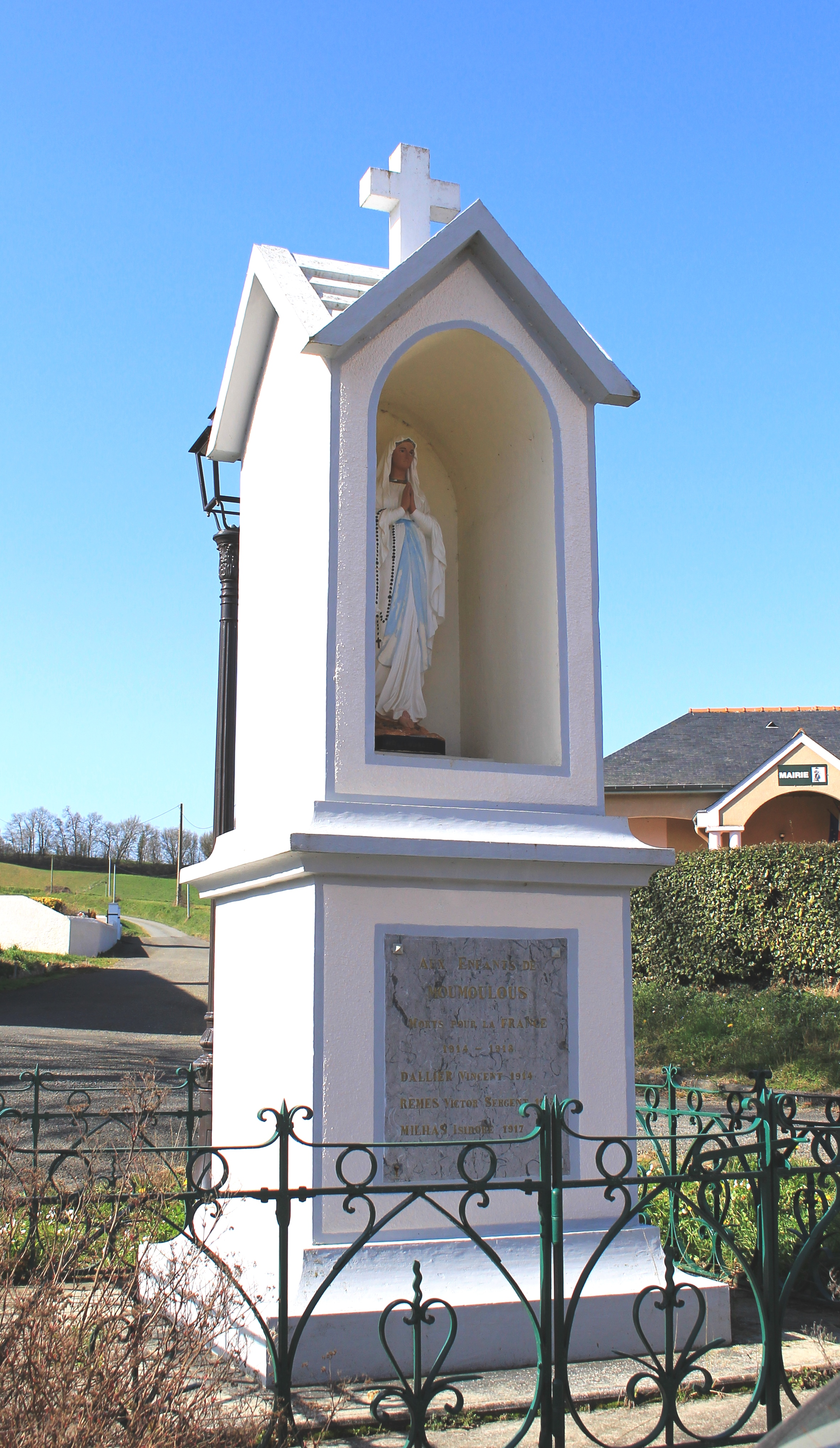 Monument aux morts de Moumoulous (Hautes-Pyrénées)